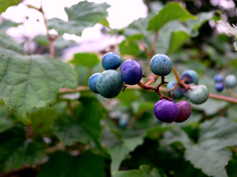 Дикий виноград. Ягоды декоративного дикого винограда